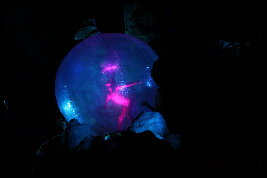 Foto dallo spettacolo Hell in the Cave (di Giandomenico Laera)